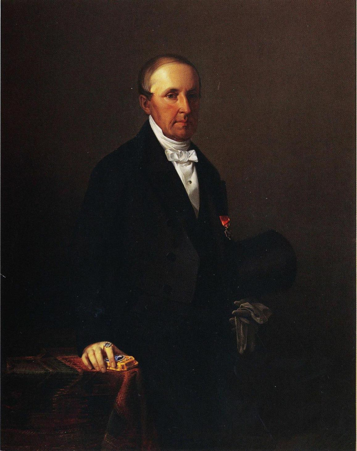 Kokkolalainen kauppaneuvos Anders Donner (1796–1857), jonka johtama vapaaehtoisjoukko löi Englannin laivaston etujoukon Krimin sodan ns. Halkokarin kahakassa 1854. Hänestä tilattiin keisarillisella määräyksellä tämä muotokuva, joka sijoitettiin Helsingin keisarilliseen palatsiin (nykyinen Presidentinlinna), missä maalaus edelleen sijaitsee. Kuvassa ovat mukana Donnerin keisari Nikolai I:ltä saamat sormus ja Pyhän Annan III luokan kunniamerkki sekä keisari Aleksanteri II:n lahjoittama kultainen nuuskarasia.